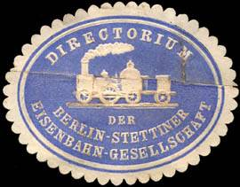 Siegelmarke der Berlin-Stettiner Eisenbahn-Gesellschaft, die 1880 von den Preußischen Staatsbahnen übernommen wurde